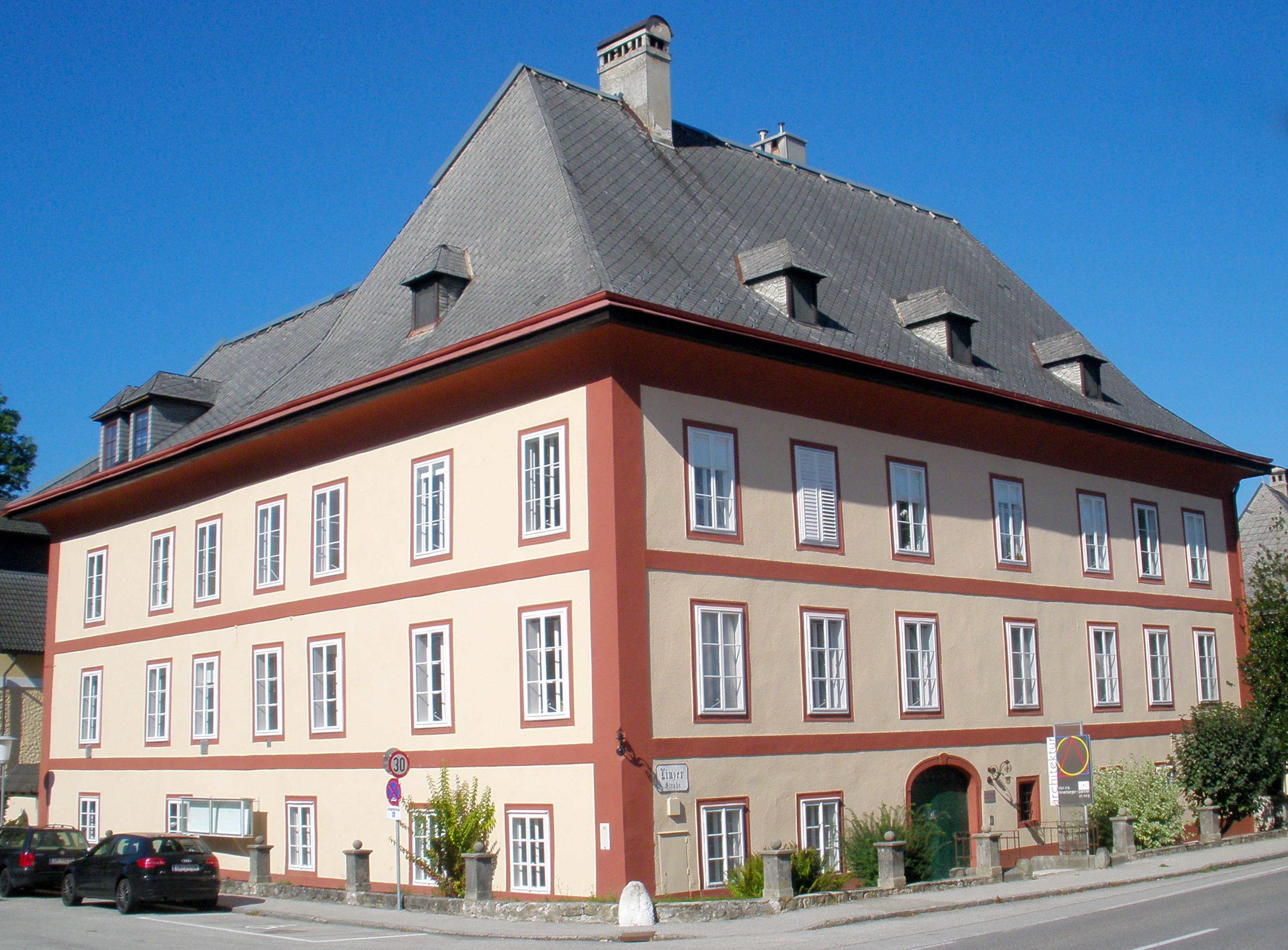 Das Schloss war Stammsitz der Familie Mühlwanger, die 1305 erstmals urkundlich Erwähnung fand. Das ursprünglich bescheidene Anwesen wurde im 16. Jahrhundert zu einem Schloss ausgebaut.